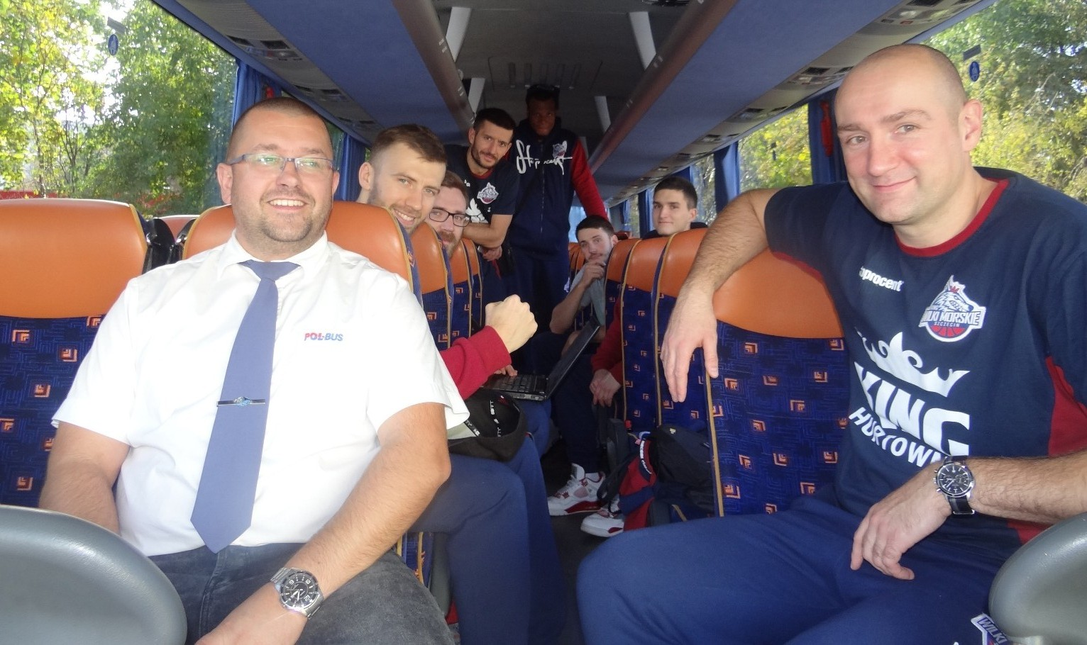 King Szczecin w Stargardzie (06.10.2018)